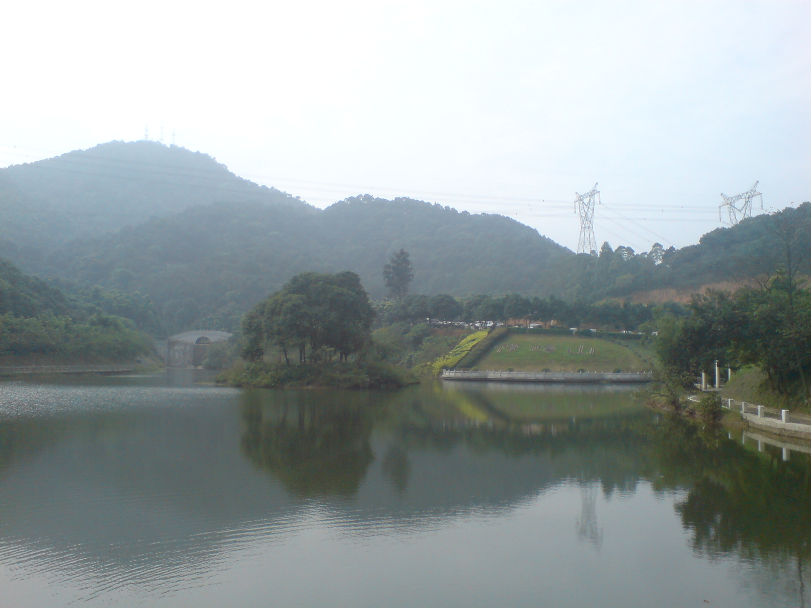 帽峰山天湖